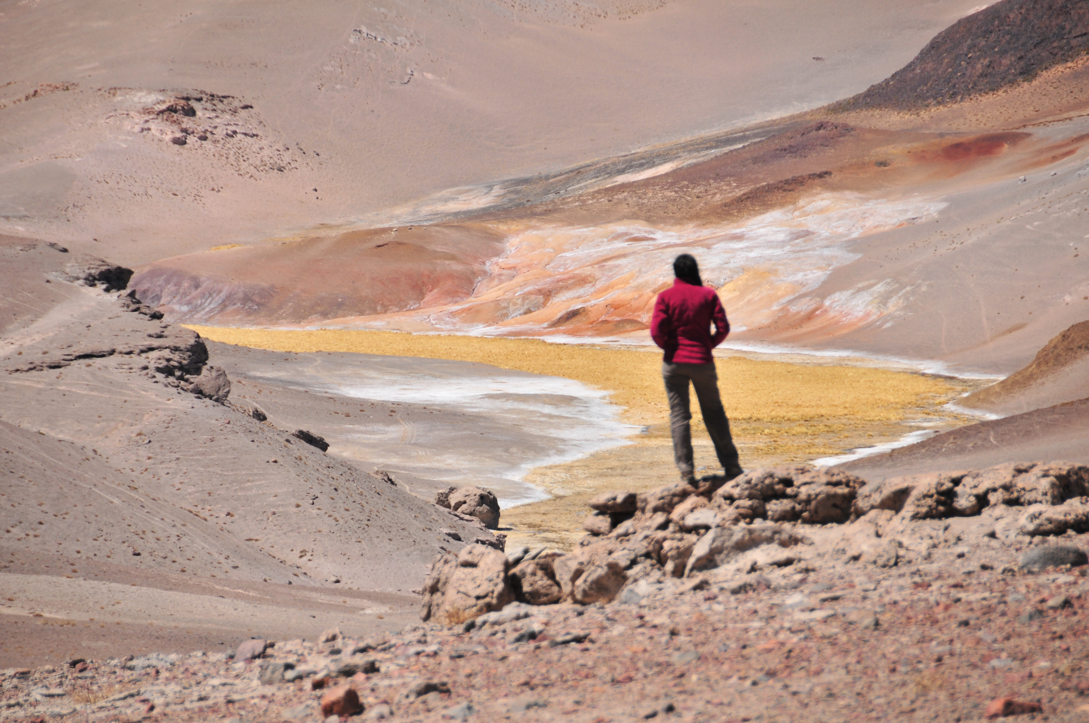 Parque Nacional Llullaillaco, vista bofedales